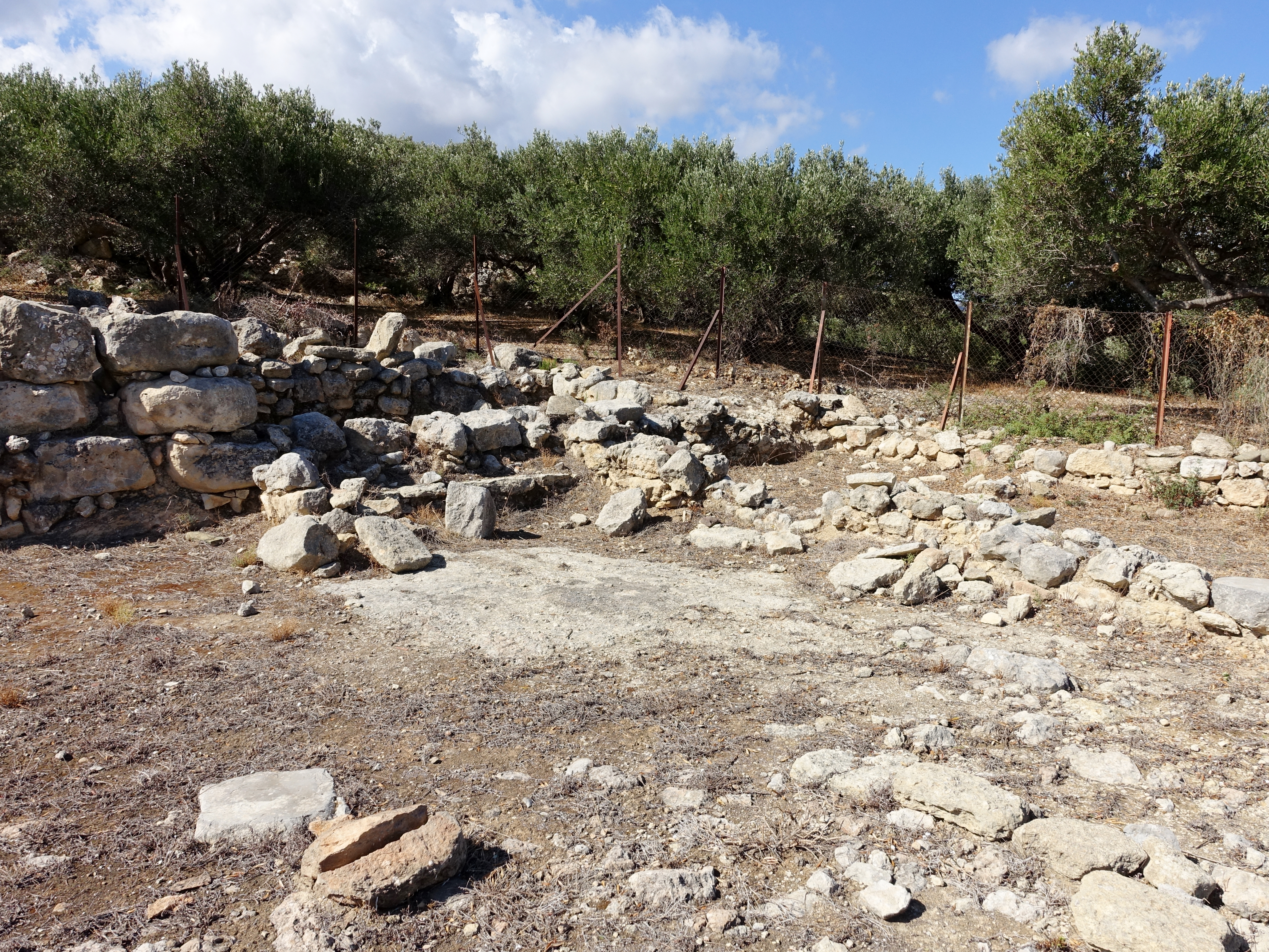 Minoische Villa von Achladia (Μινωική έπαυλη Αχλαδίων), Gemeinde Sitia, Kreta, Griechenland